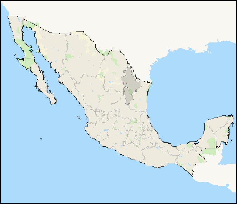 Mapa del distrito electoral federal 6 de Nuevo León ubicado en México